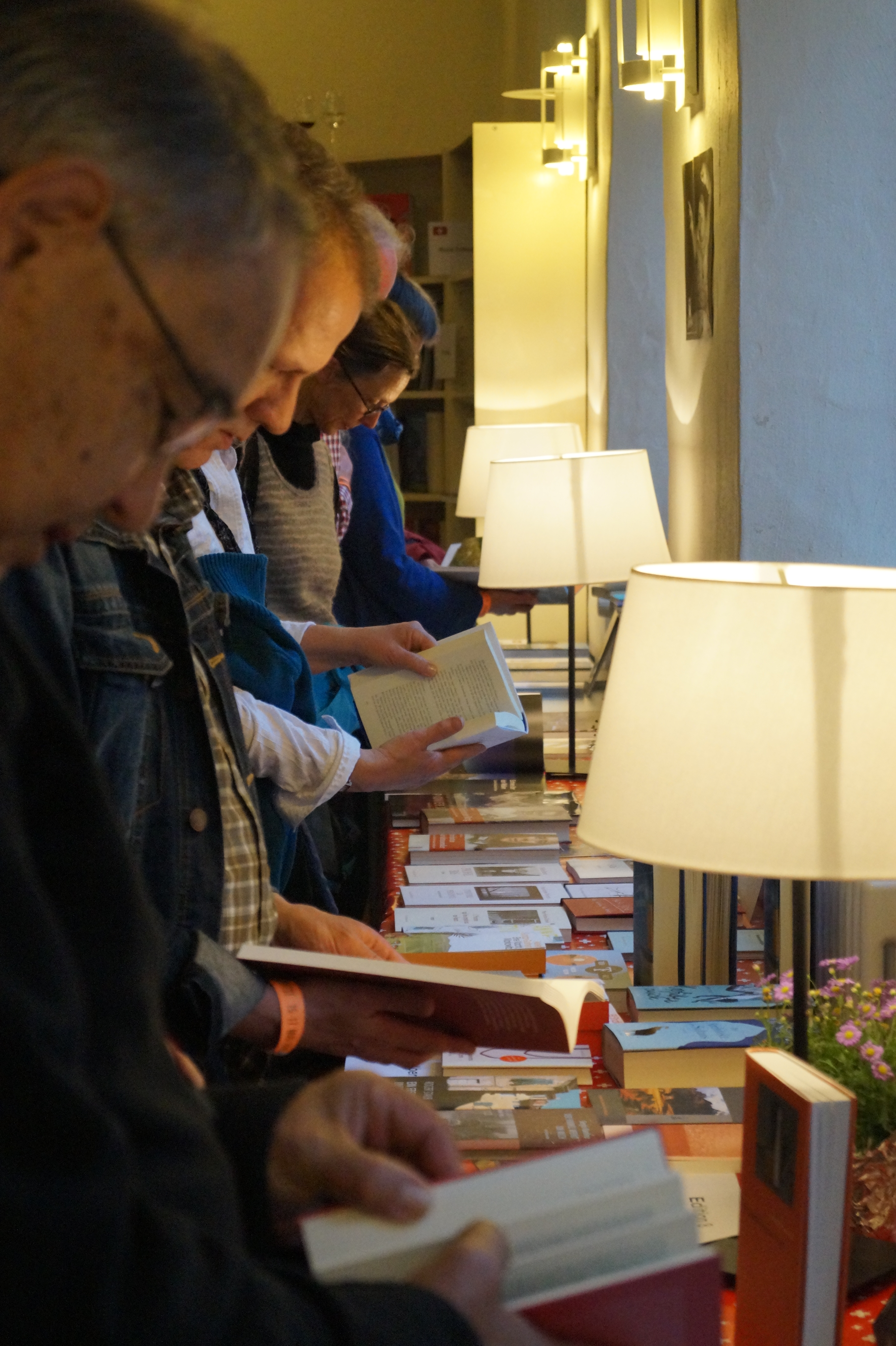 Besucher der Ausstellung Schweizer Verleger beim Tübinger Bücherfest 2015